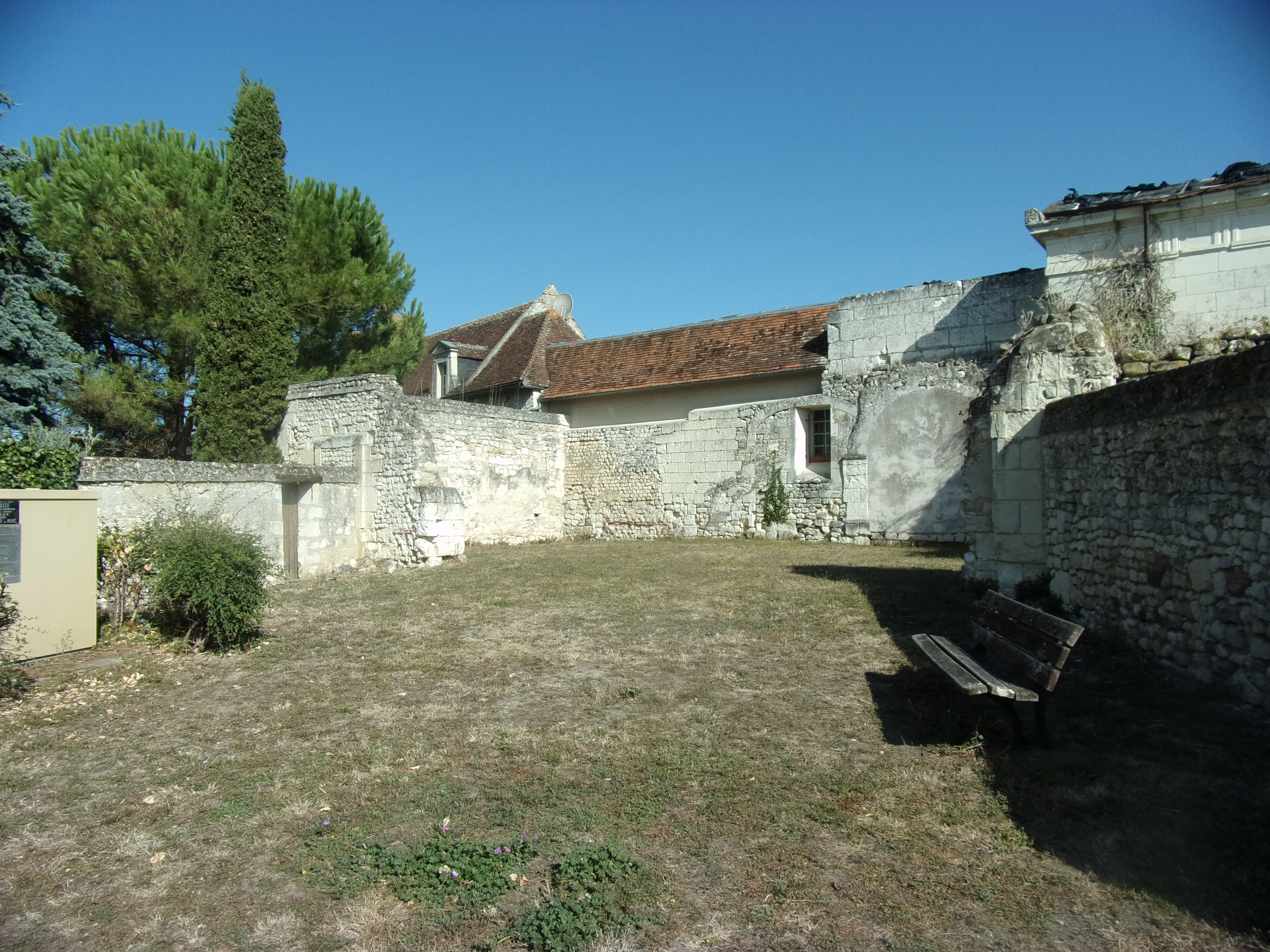 Ancienne église Saint-Jean-Baptiste de Mougon (ruines)